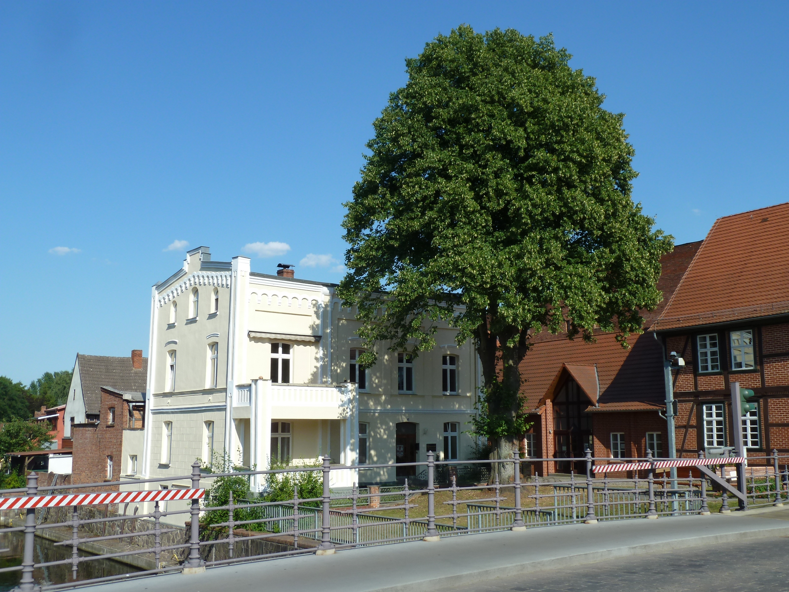 Grabow, denkmalgeschütztes Wohnhaus Kleiner Wandrahm 20,Ecke Marktstraße